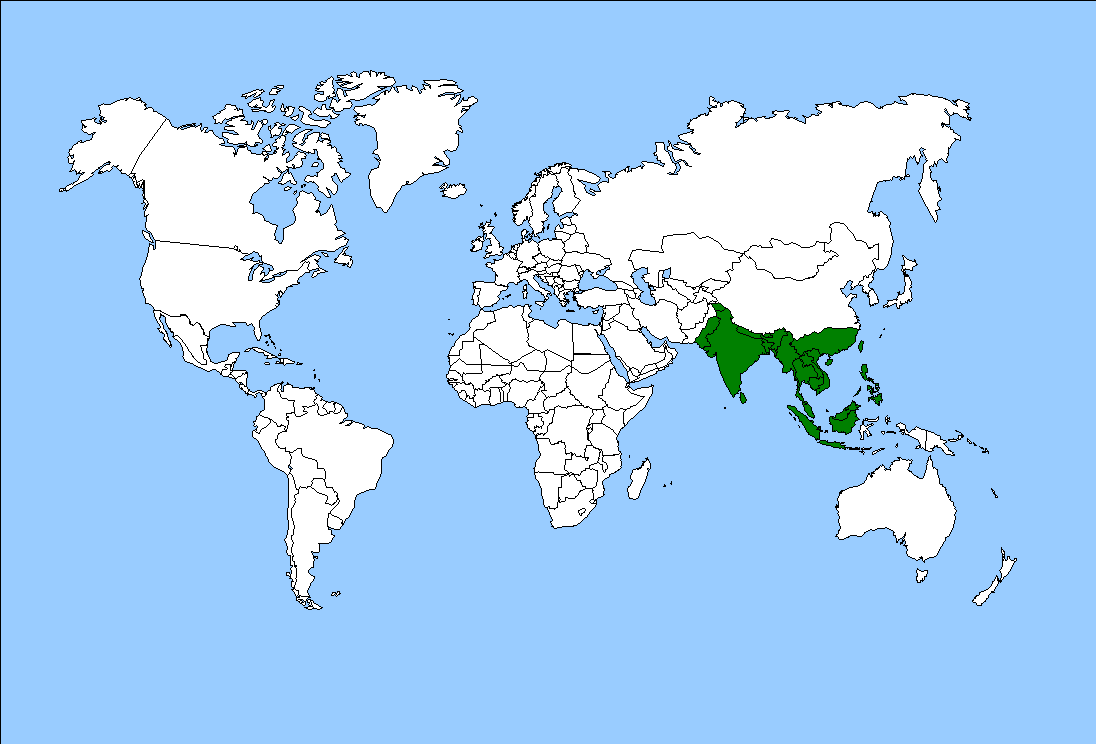 écozone indomalaise